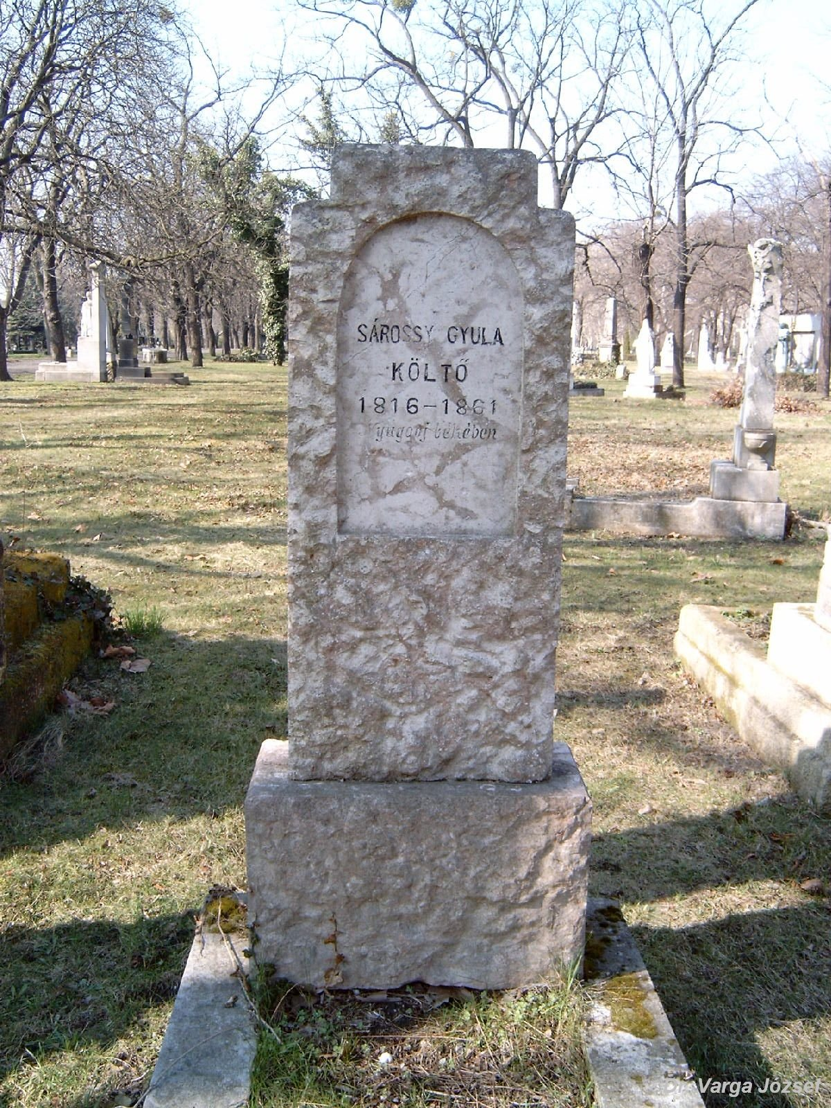 Sárosi Gyula, családi neve: Sárosy Lajos (Borossebes, 1816. febr. 12. – Pest, 1861. nov. 16.) költő sírja Budapesten. Kerepesi temető: 29/1-1-6.